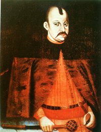 Ольбрахт-Владислав Радзивілл